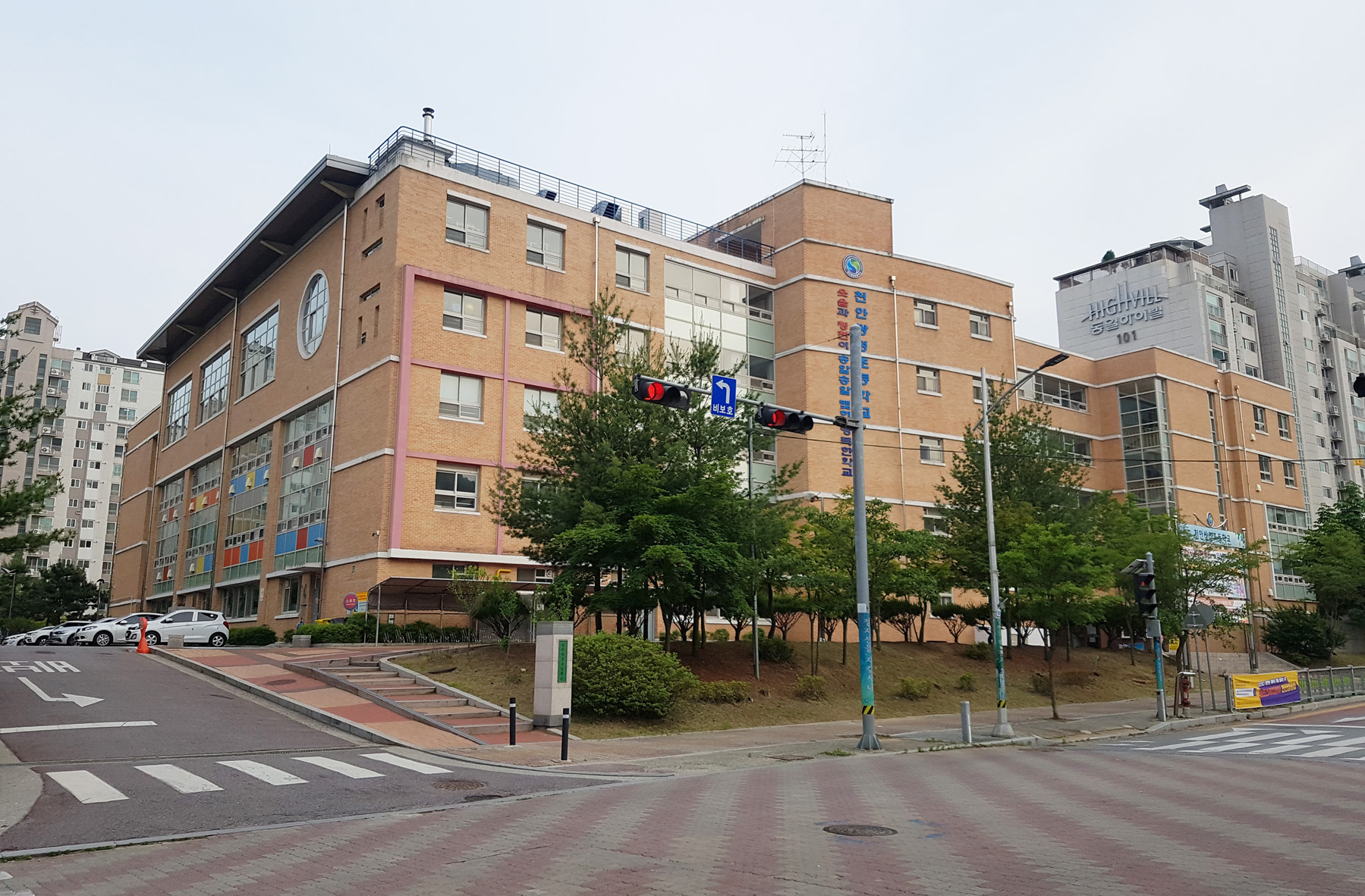 천안쌍정초등학교 정문